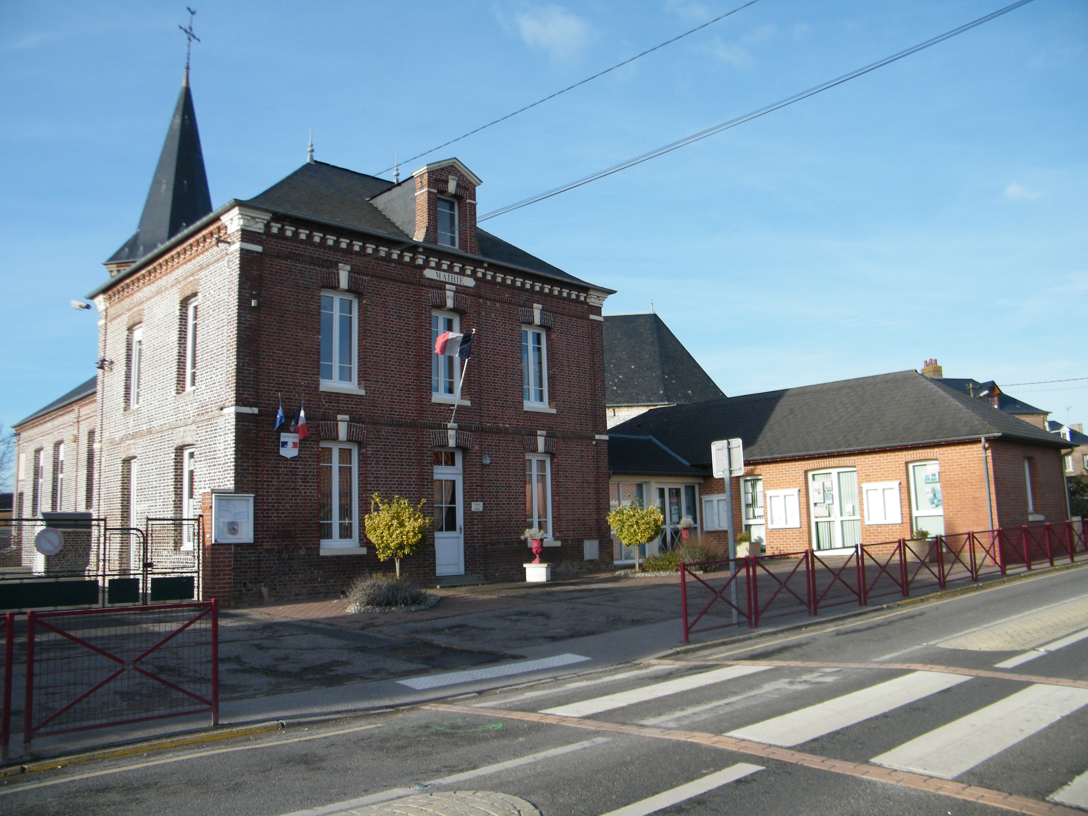 Mairie, près de l'église.